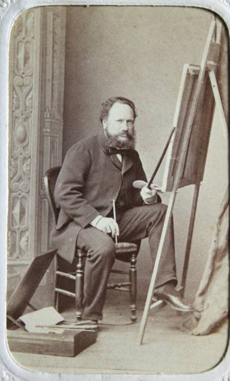 François Auguste Ortmans